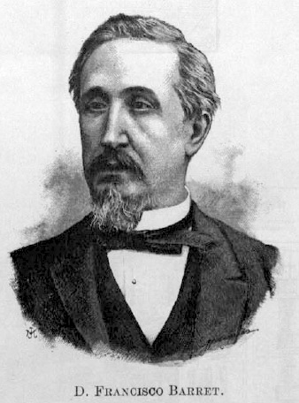 Francesc Barret i Druet (Barcelona l'any 1817 - Blanes, 1881) fou un jurisconsult